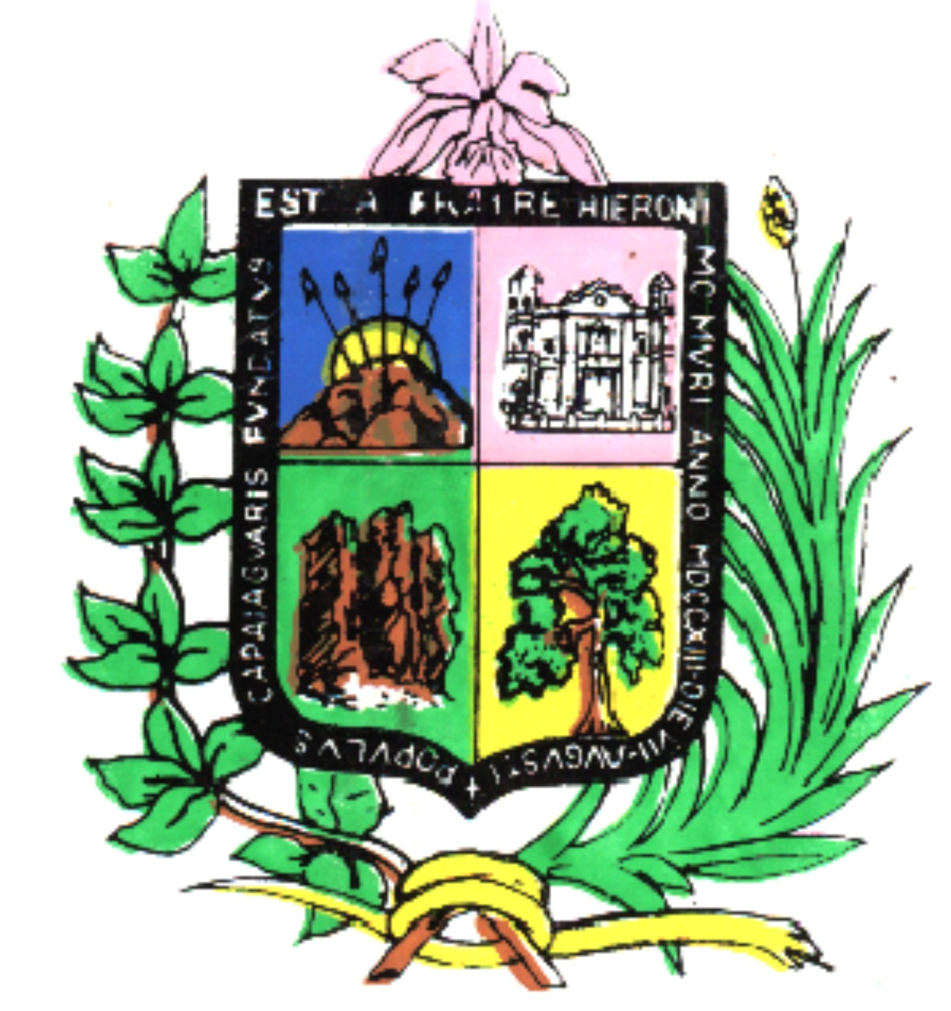 Escudo del Municipio acosta